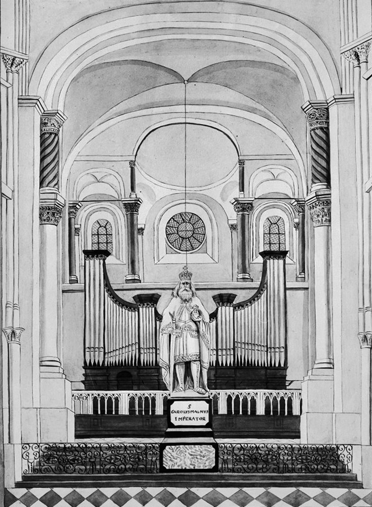 Sint Servaaskerk: interieurtekening Westwerk met standbeeld Karel de Grote